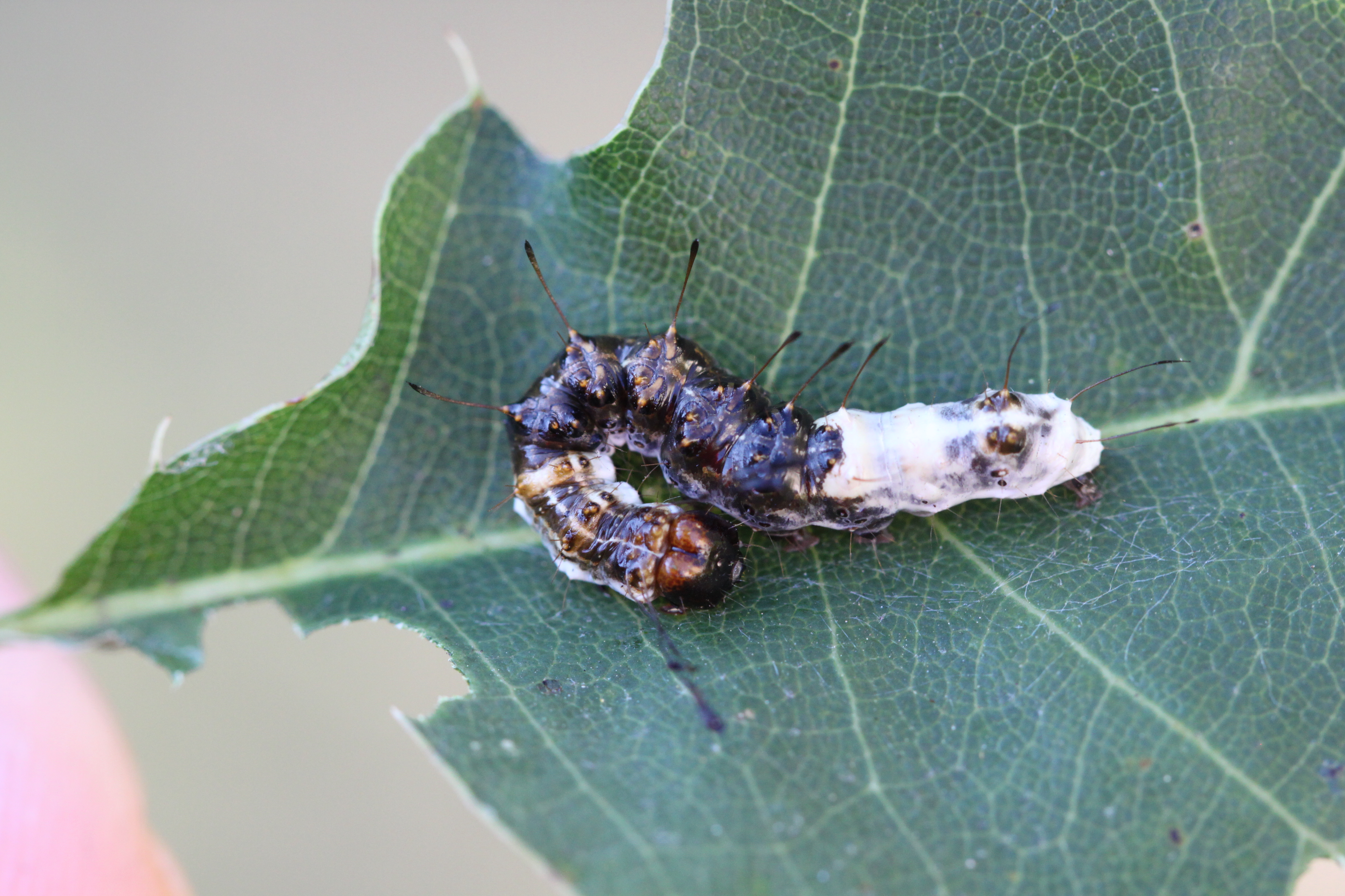 Junge Raupe der Erlen-Rindeneule (Acronicta alni) in Tarnstellung (Vogelkotmimese), im Schwetzinger Hardt